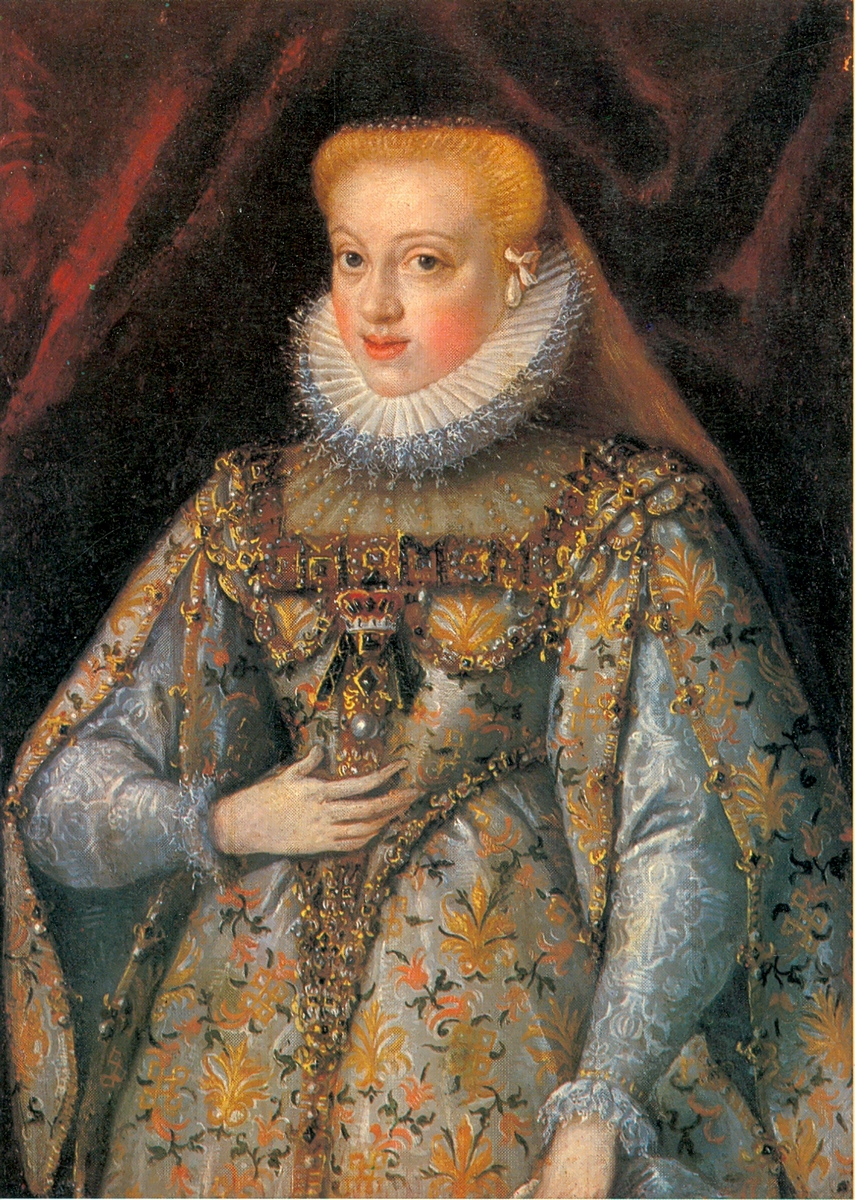 Báthori Zsigmond felesége, Mária Christierna